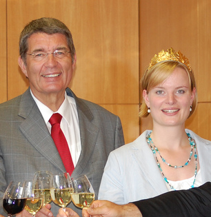 OB Jens Beutel, rheinhessische Weinprinzessin Judit Zehe und fünf Gläser Wein